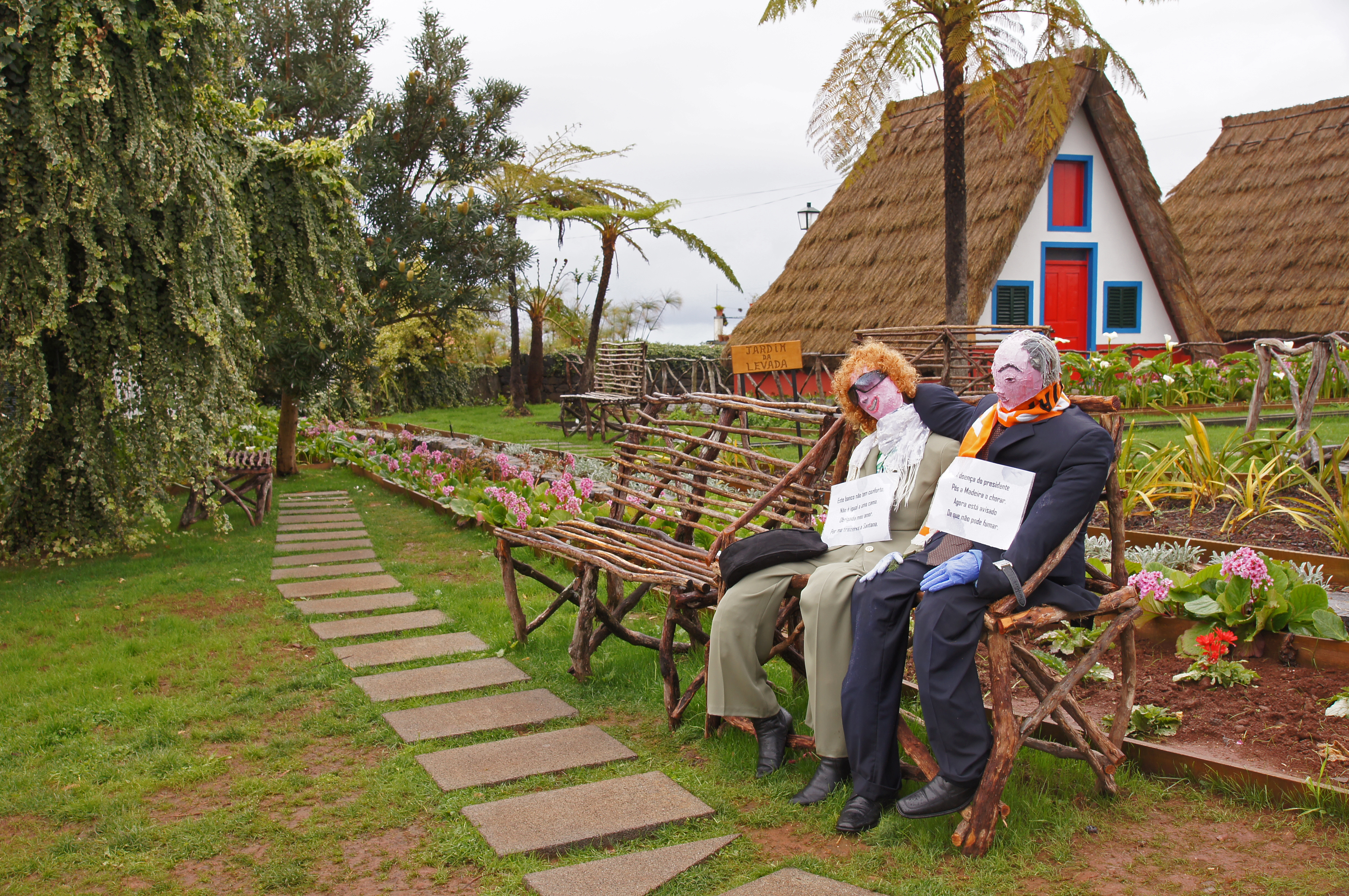 2011-03-05 03-13 Madeira 045 Santana